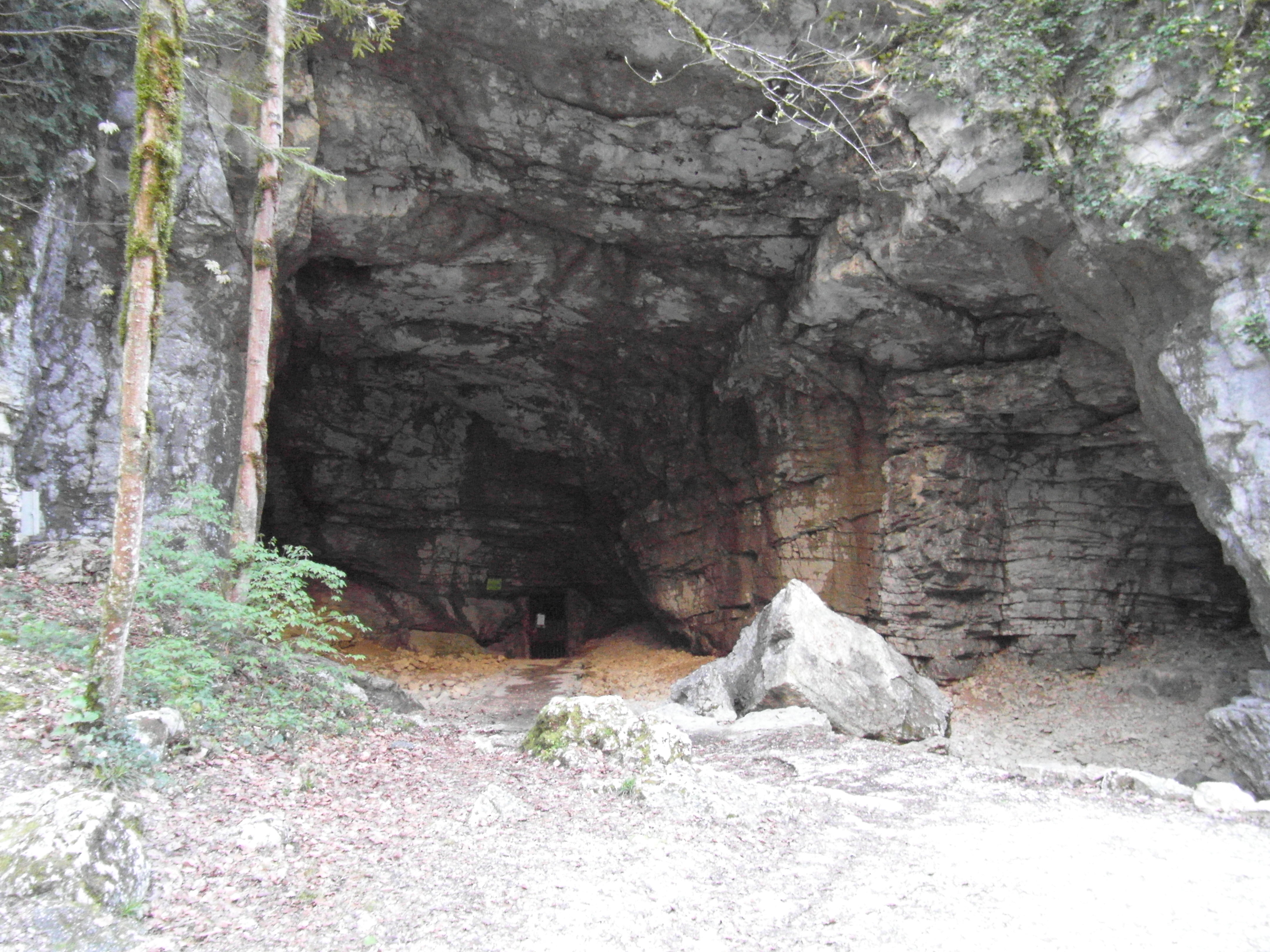 Grotte inférieure des échelles